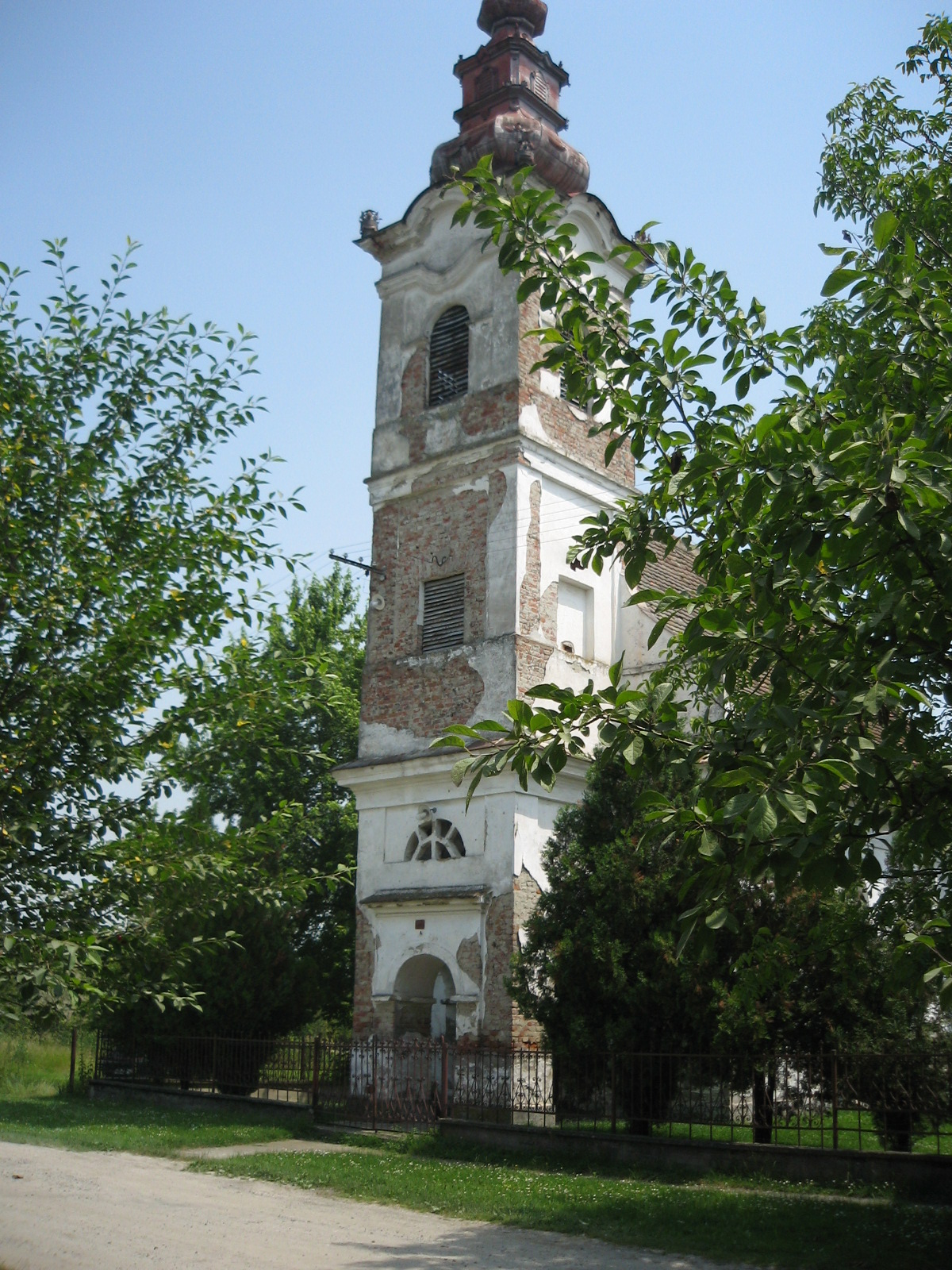 Crkva svetog Ilije u Poganovcima